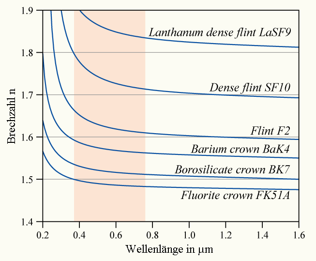 Änderung der Brechzahl als Funktion der Wellenlänge